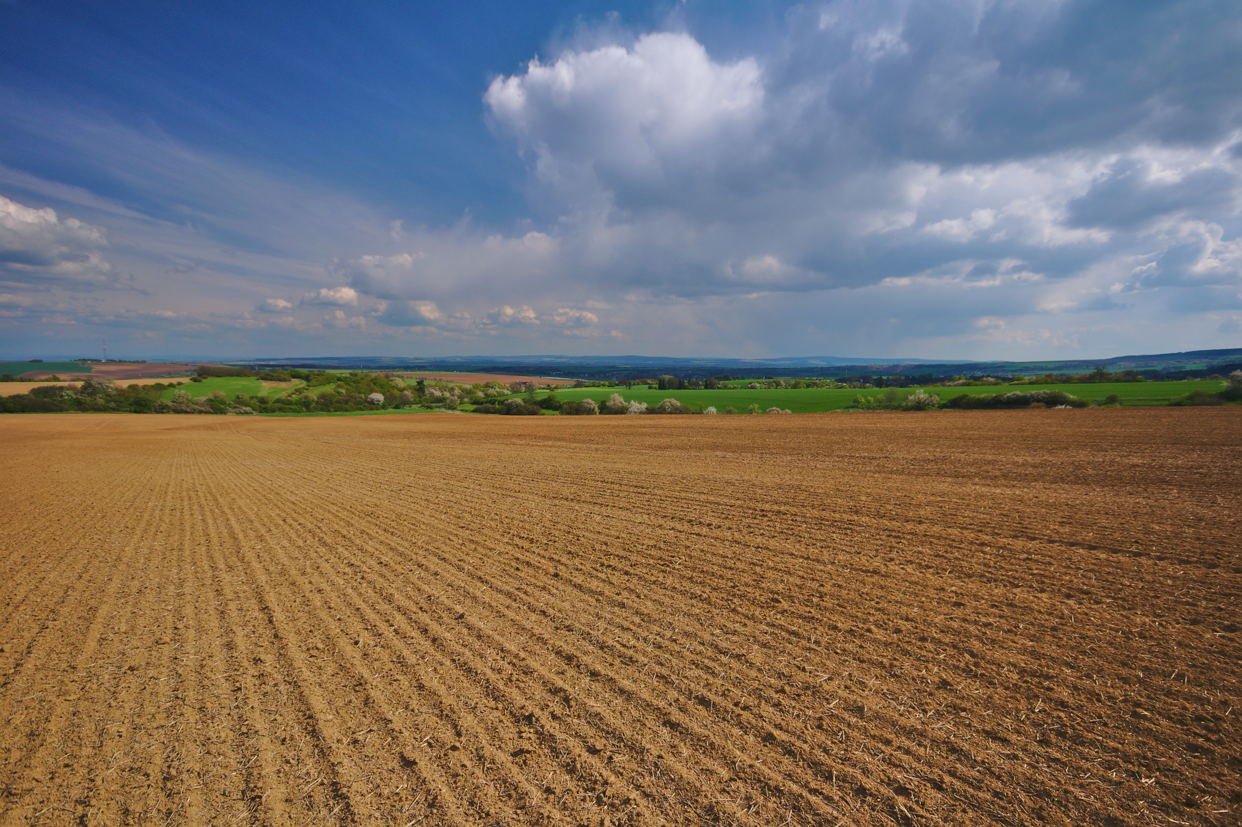 Výhled na Hanou od Vincencova, okres Prostějov